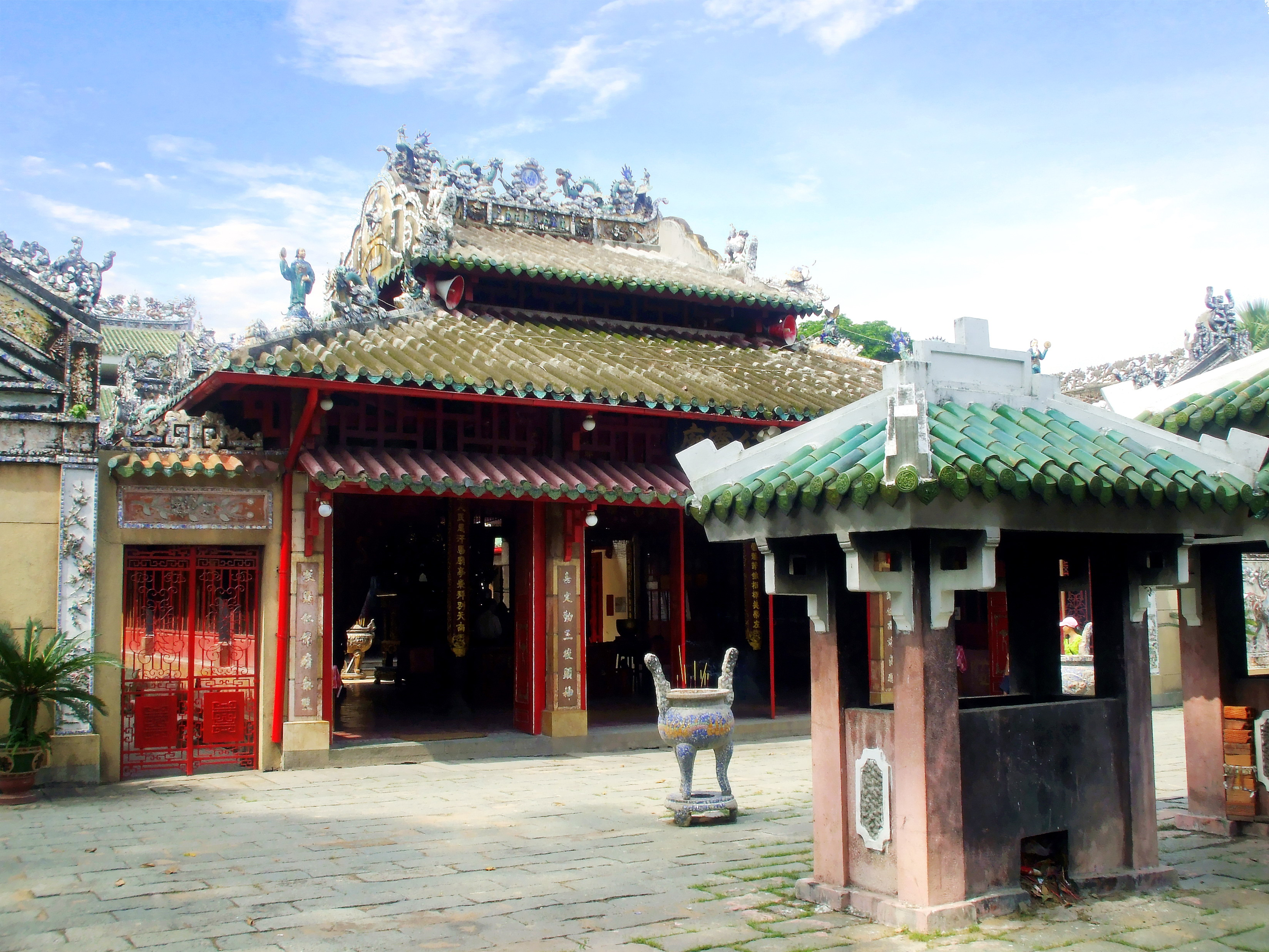 Miếu thờ Lê Văn Duyệt trong khu lăng của ông, nay thuộc quận Bình Thạnh, TP. Hồ Chí Minh, Việt Nam)